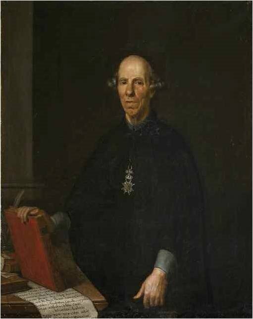 Retrato del filólogo, numismático y jurista español Francisco Pérez Bayer (1711-1794), que llegó a ser catedrático de la Universidad de Salamanca.